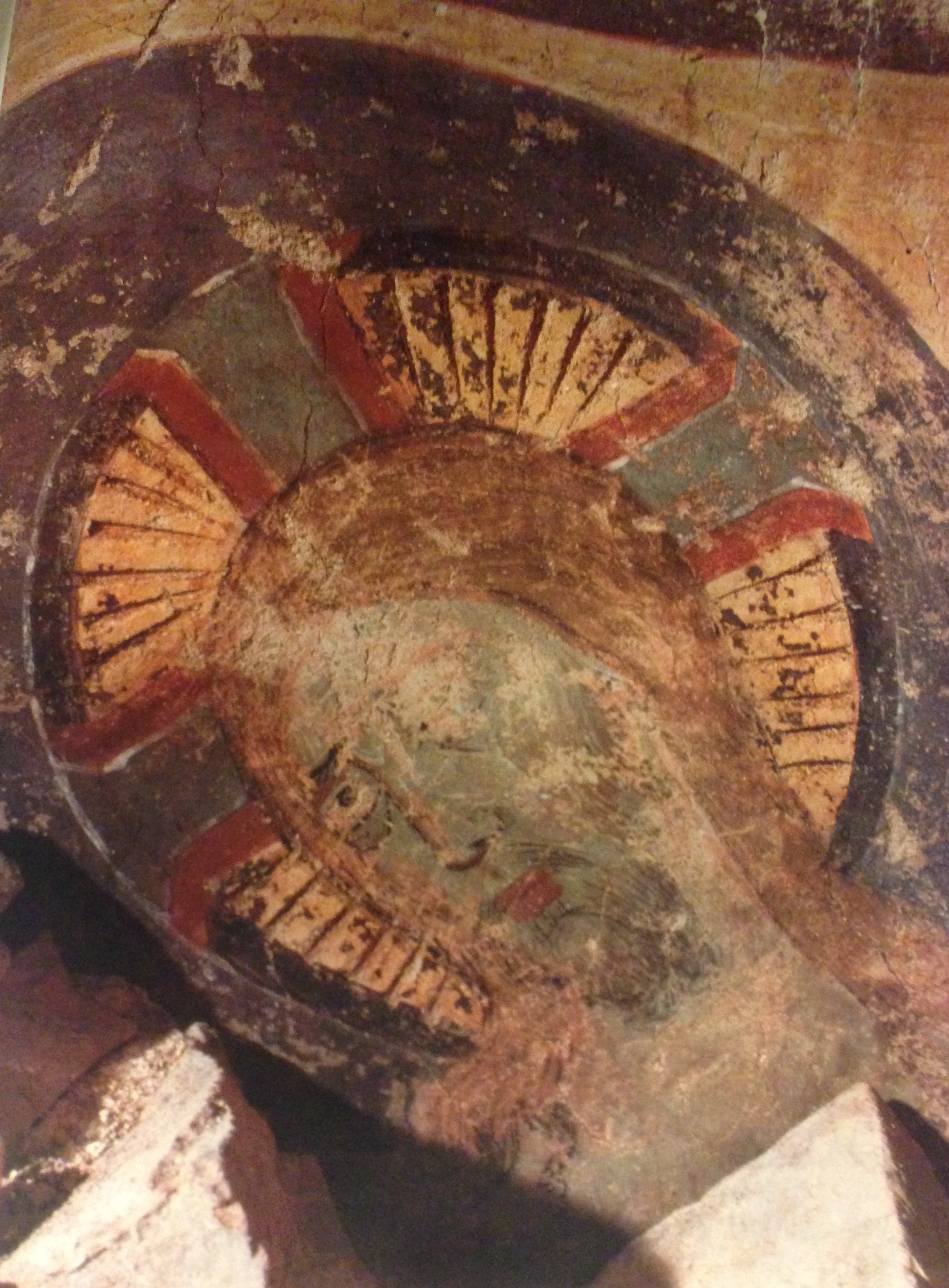 Affresco Maestro delle Palazze. Chiesa SS.Giovanni e Paolo. Spoleto